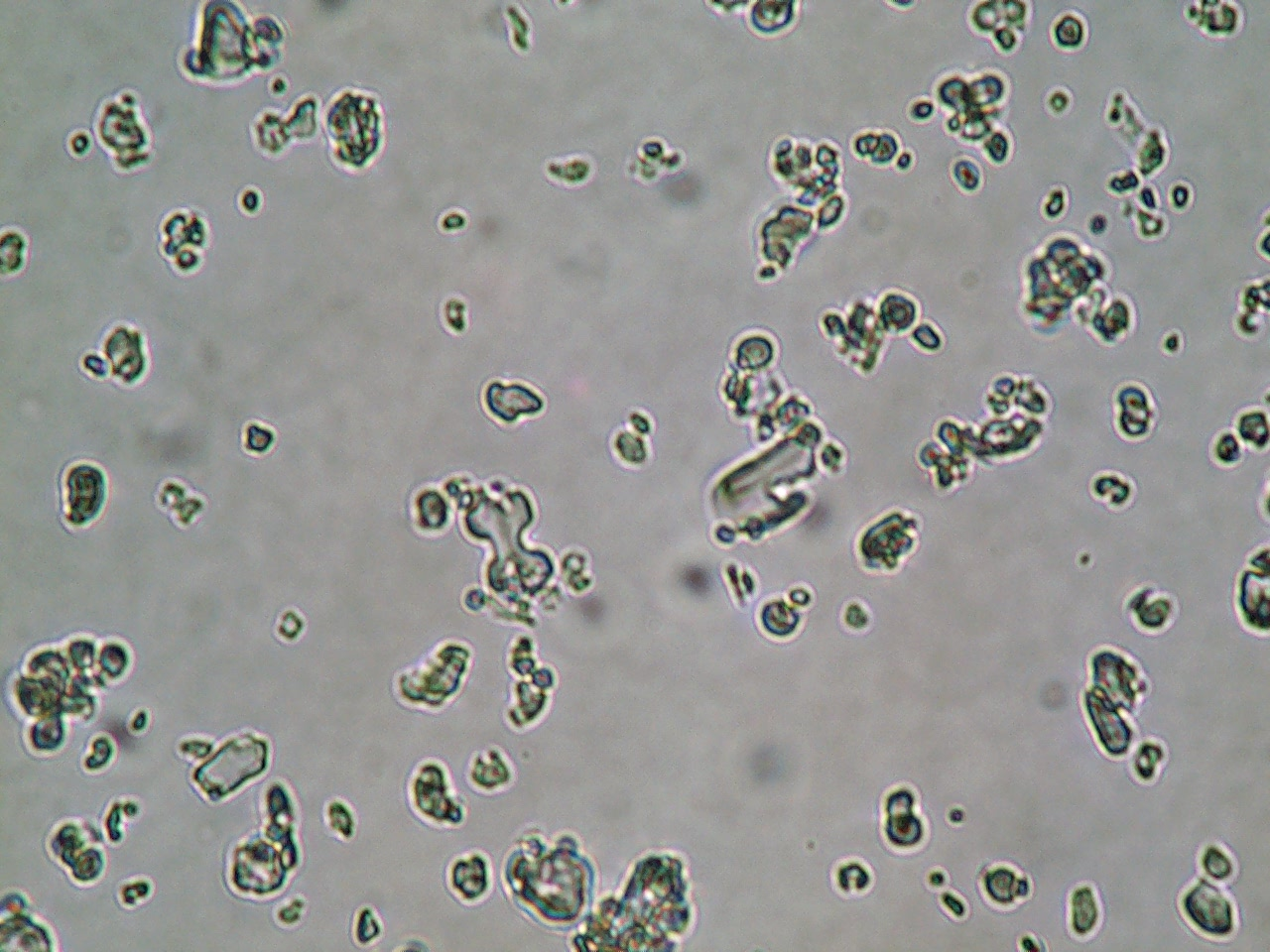 FR:Description Photographie au microscope de phytolithes (dont un en haltères) Photographe: Henri-Georges NATON Préparation des phytolithes : Claire Delhon Source: importé par le photographe Licence: GFDL-self